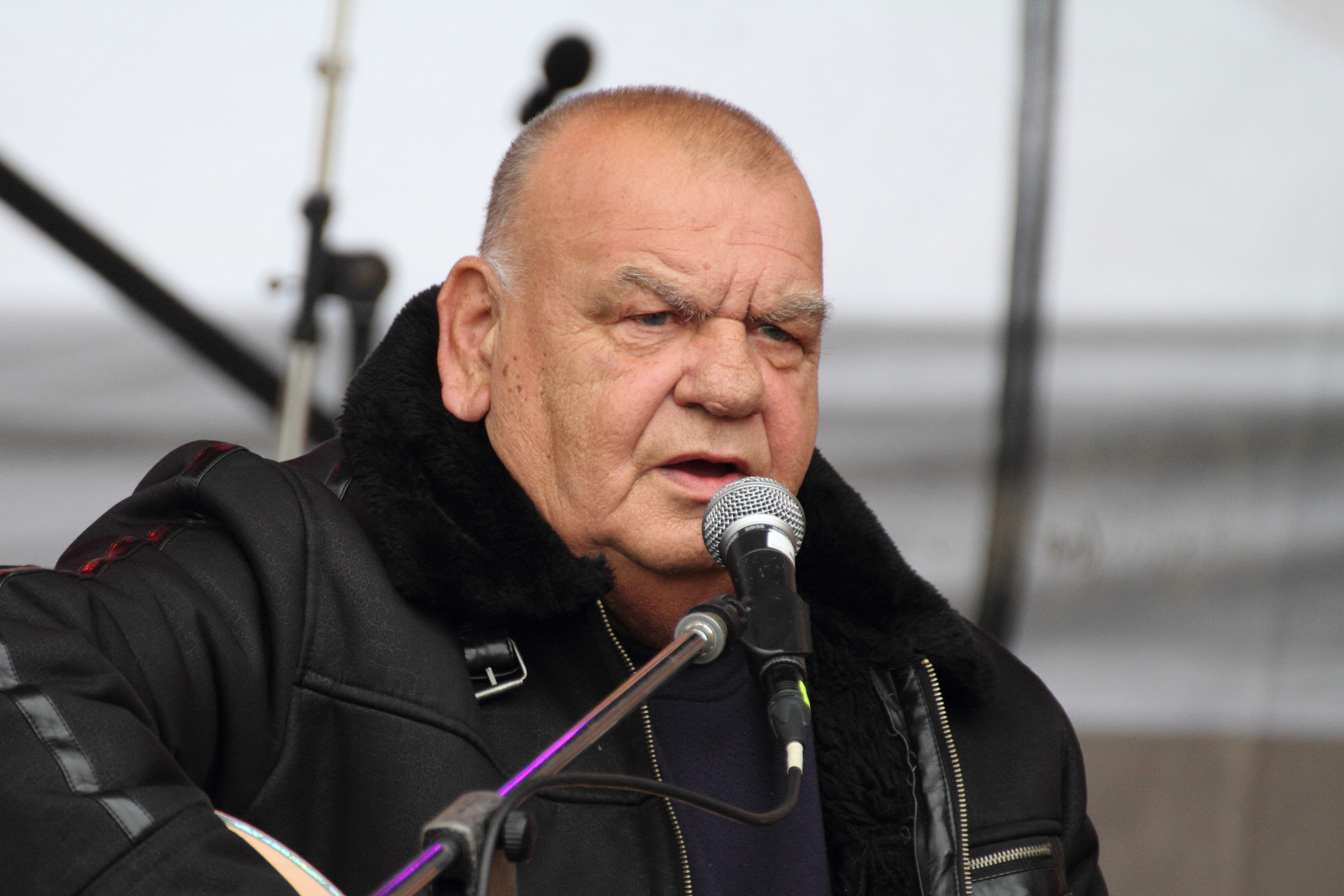 František Nedvěd na 15. krajských dožínkách Libereckého kraje (Radimovice/Sychrov)